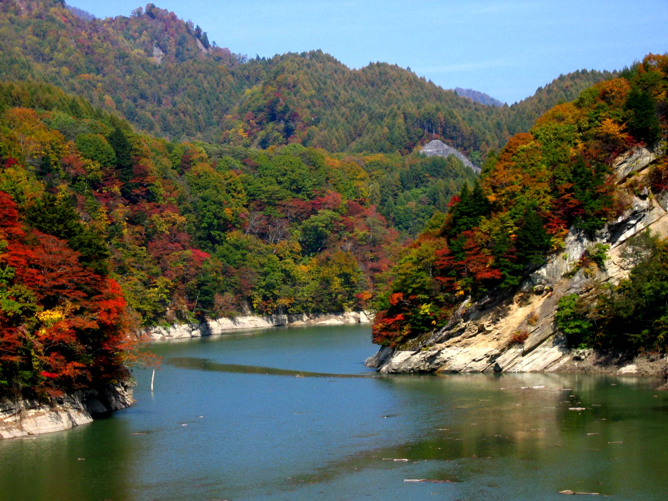 Okususobana Dam (奥裾花ダム) makes a lake.